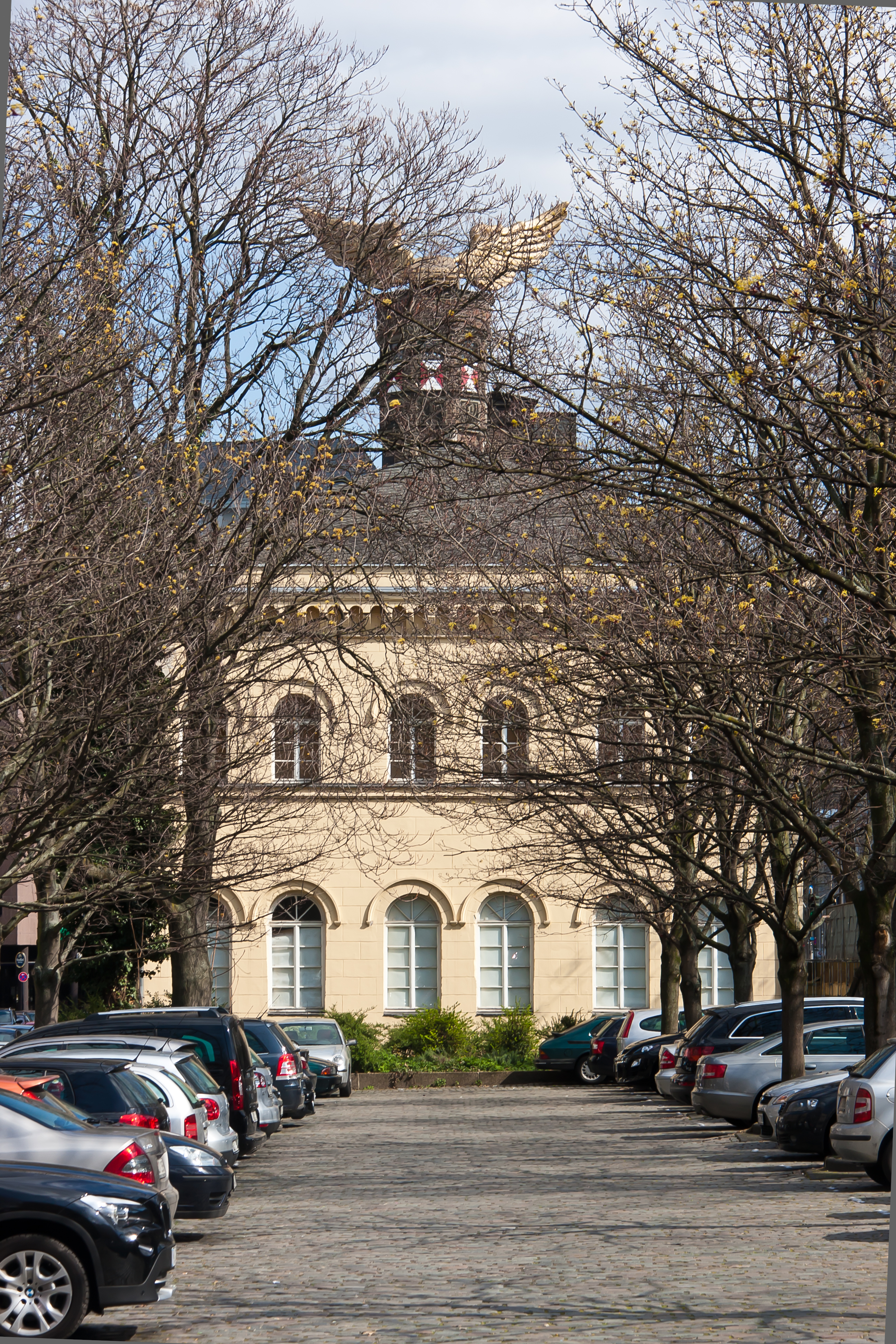 Alte Wache, Ansicht von Parkplatz der Bezirksregierung Köln. Baujahr: 1840-1841. Das Gebäude gehört zum Kölnischen Stadtmuseum und wird für Wechselausstellungen genutzt. Im Hintergrund ist das Flügelauto von HA Schult auf dem Turm des Zeughauses zu sehen. This is a photograph of an architectural monument.